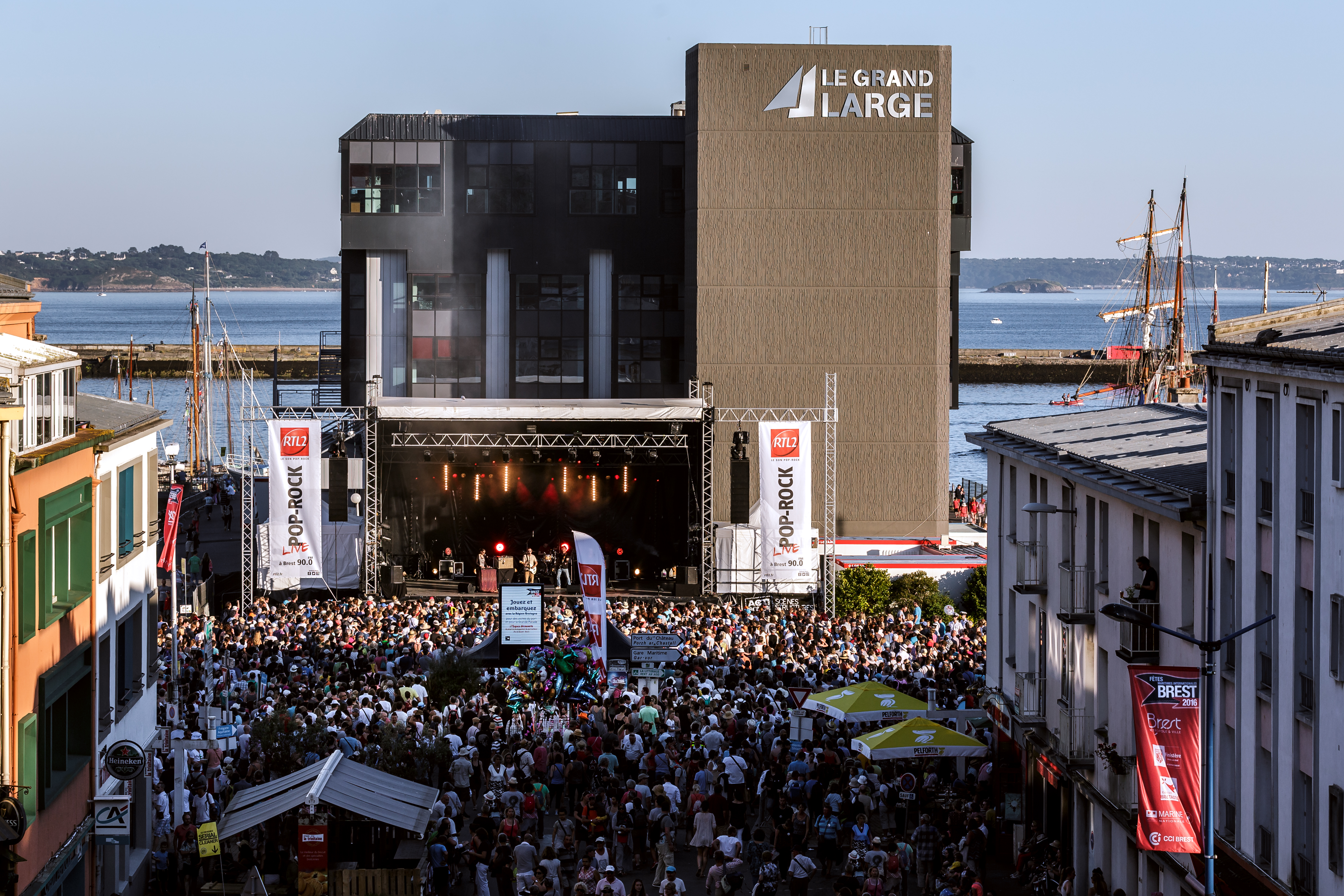 Mickey3d en concert exceptionnel RTL2 sur la grande scène de Brest 2016.